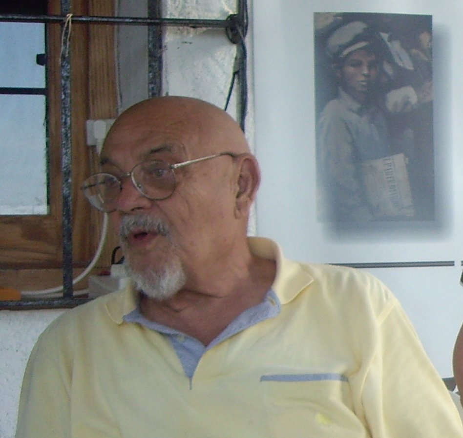 Ramón Castañera Agres 2007